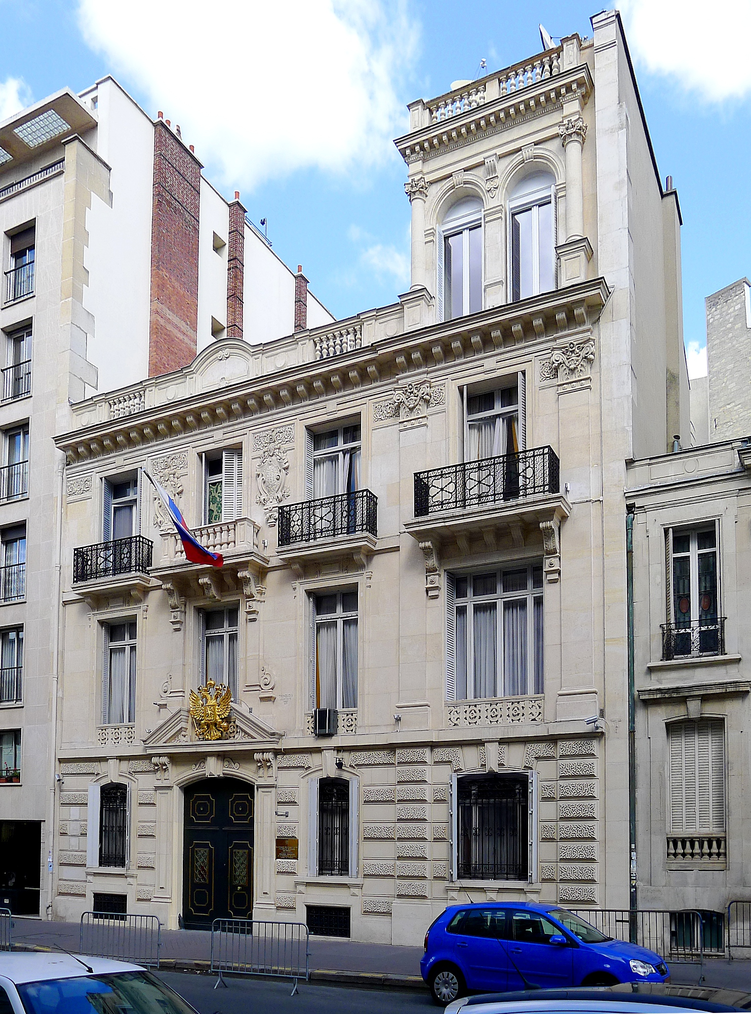 Rue de Prony - Paris XVII N°8 : délégation permanente de la fédération de Russie